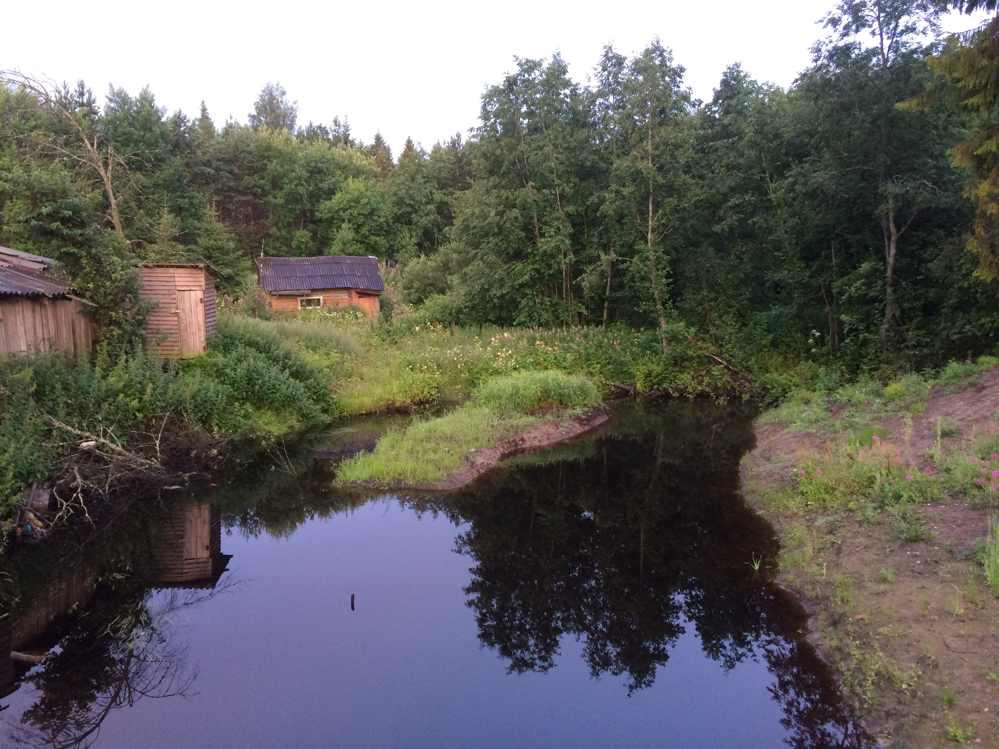 Руокооя (приток Аурайоки)